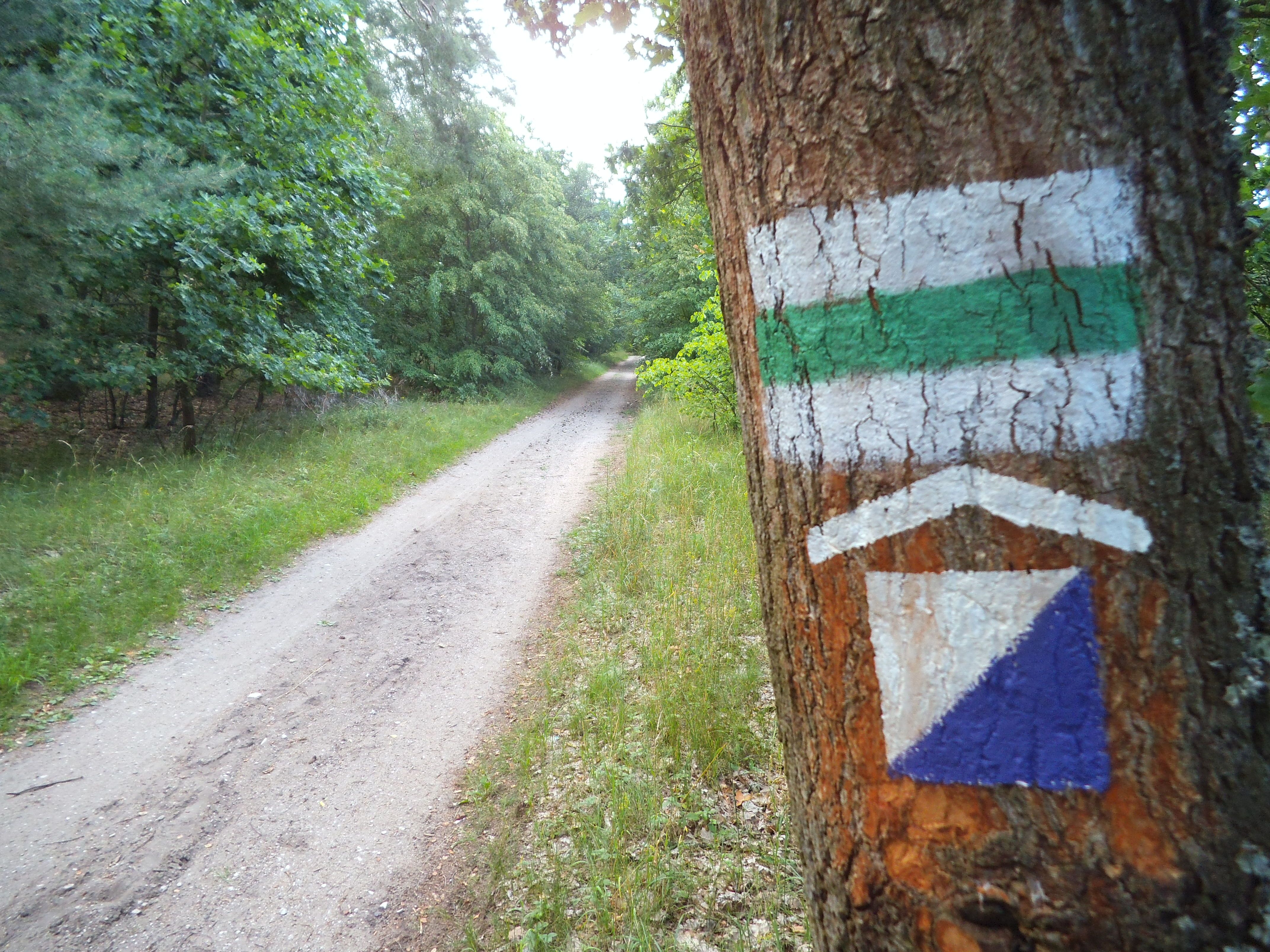 Szlaki turystyczne na terenie Barbarki w Toruniu